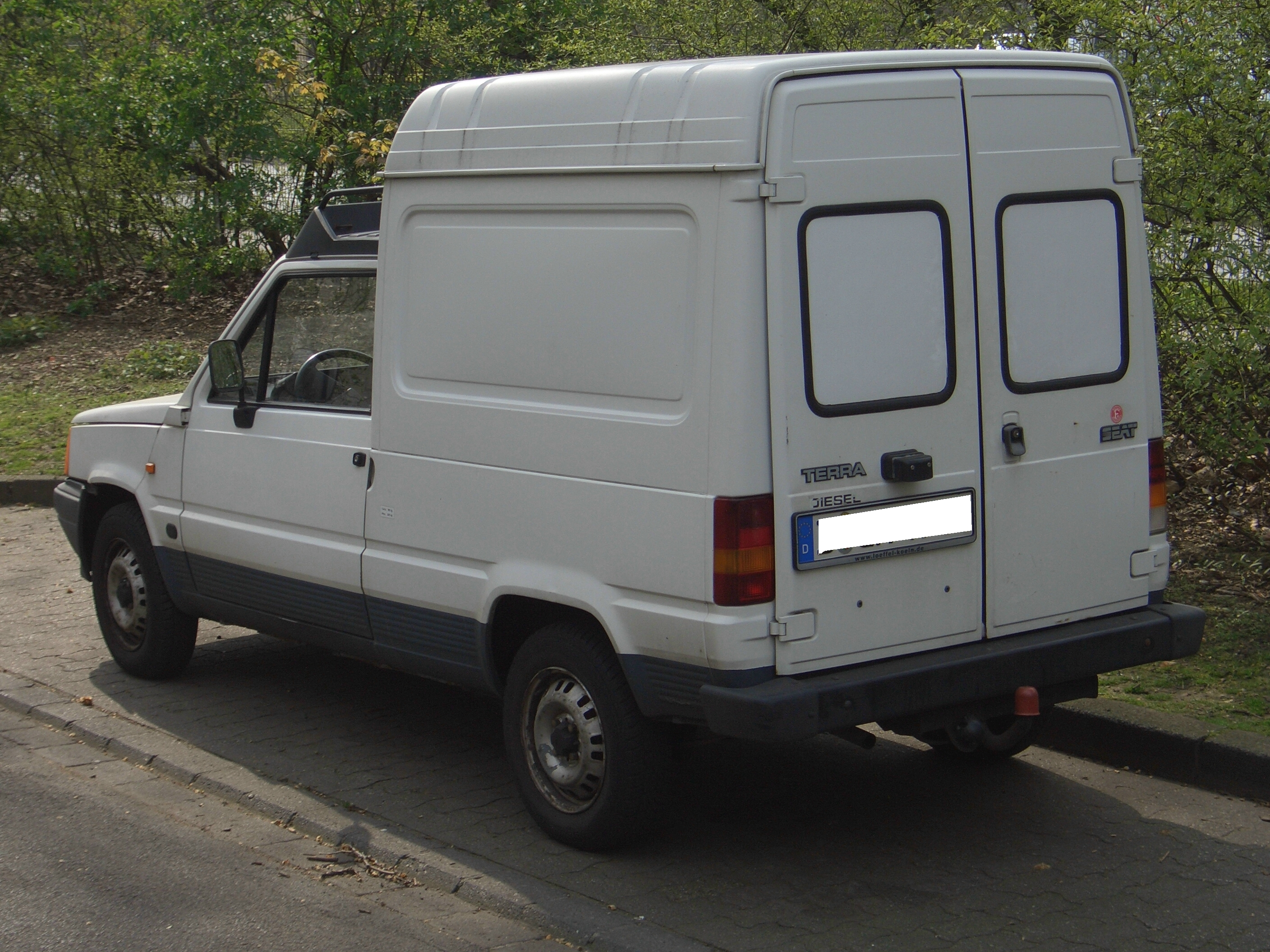 Seat Terra Diesel, closed delivery van, 1983-1995. seen in Duesseldorf, Germany